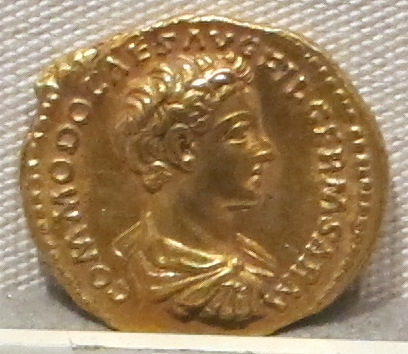 Palazzo Massimo alle Terme